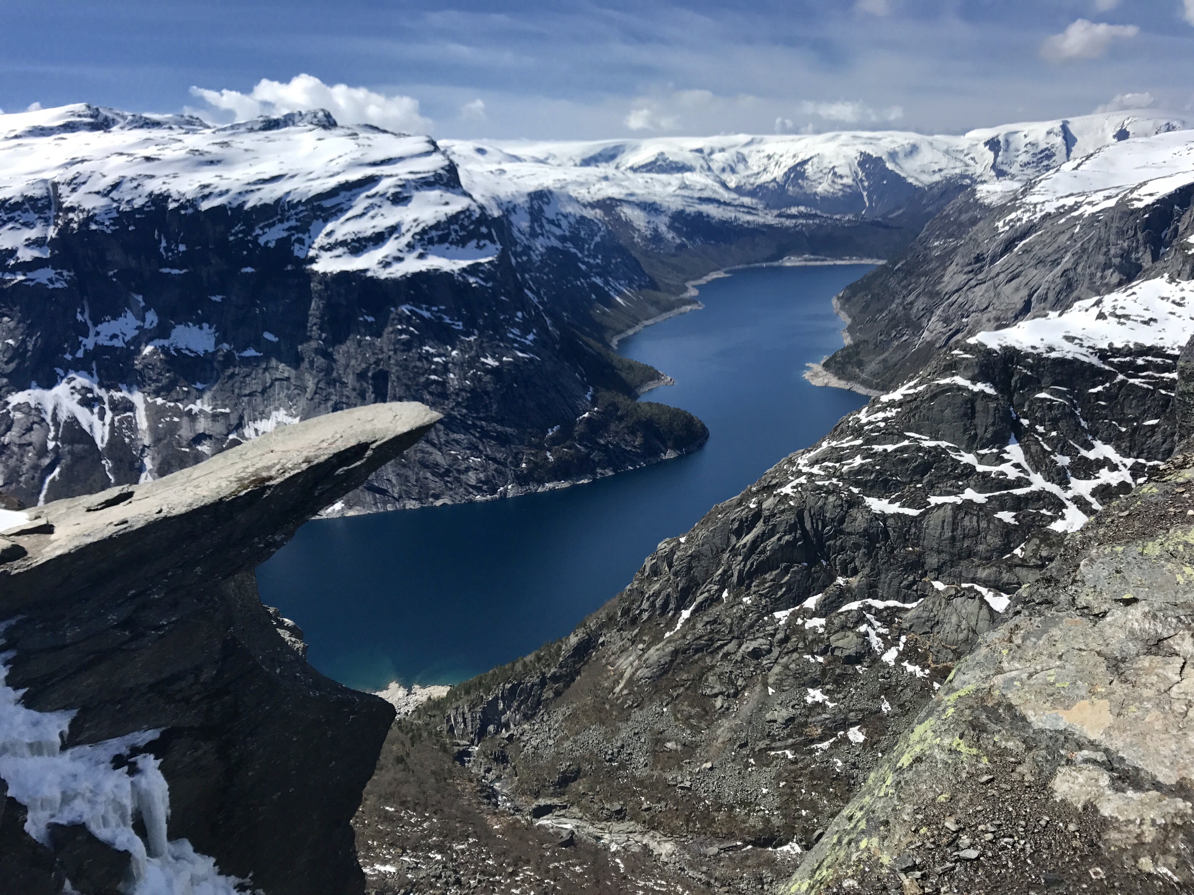 Trolltunga in Odda, Norway.